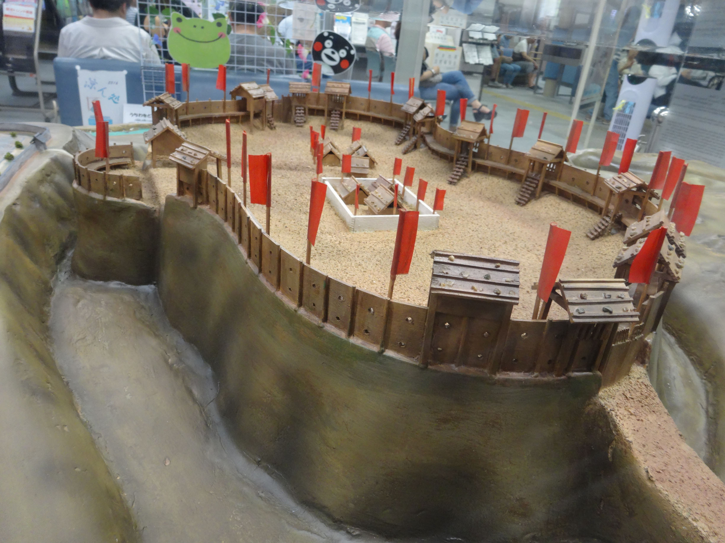 真田丸復元ジオラマ 大阪府・天王寺区役所 監修・千田嘉博（奈良大学学長）